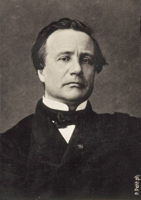 Victor Duruy photographié par Pierre Petit.